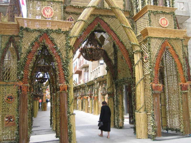 San Biagio Platani, Sicilia, Italia